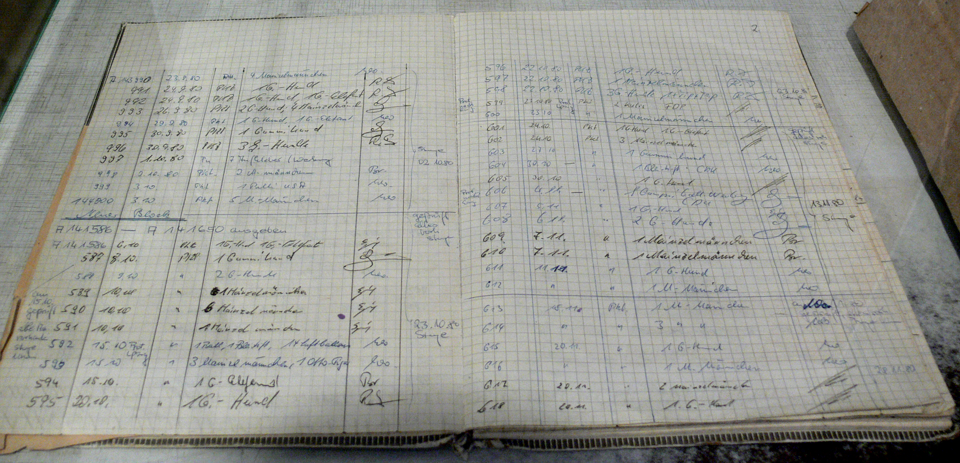 Hamburg, Deutsches Zollmuseum „Anschreibebuch“ der Paketkontrolle der DDR mit Liste der beschlagnahmten oder zurückgewiesenen Gegenstände, hier häufig: Mainzelmännchen-Figuren (Maskottchen des westdeutschen ZDF), Inv. Nr. DZM 1.002.122